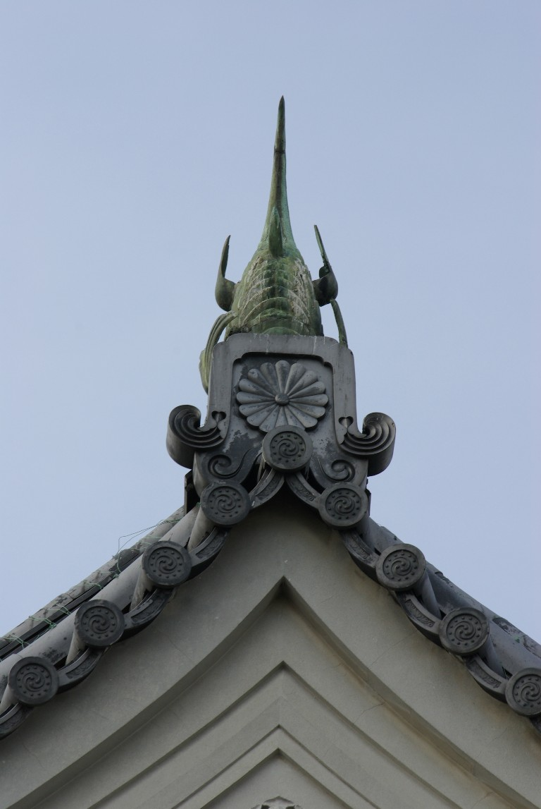 本丸隅櫓に残された菊花紋瓦